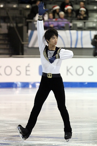 Ryuju Hino на финале Гран-при среди юниоров сезона 2011-2012